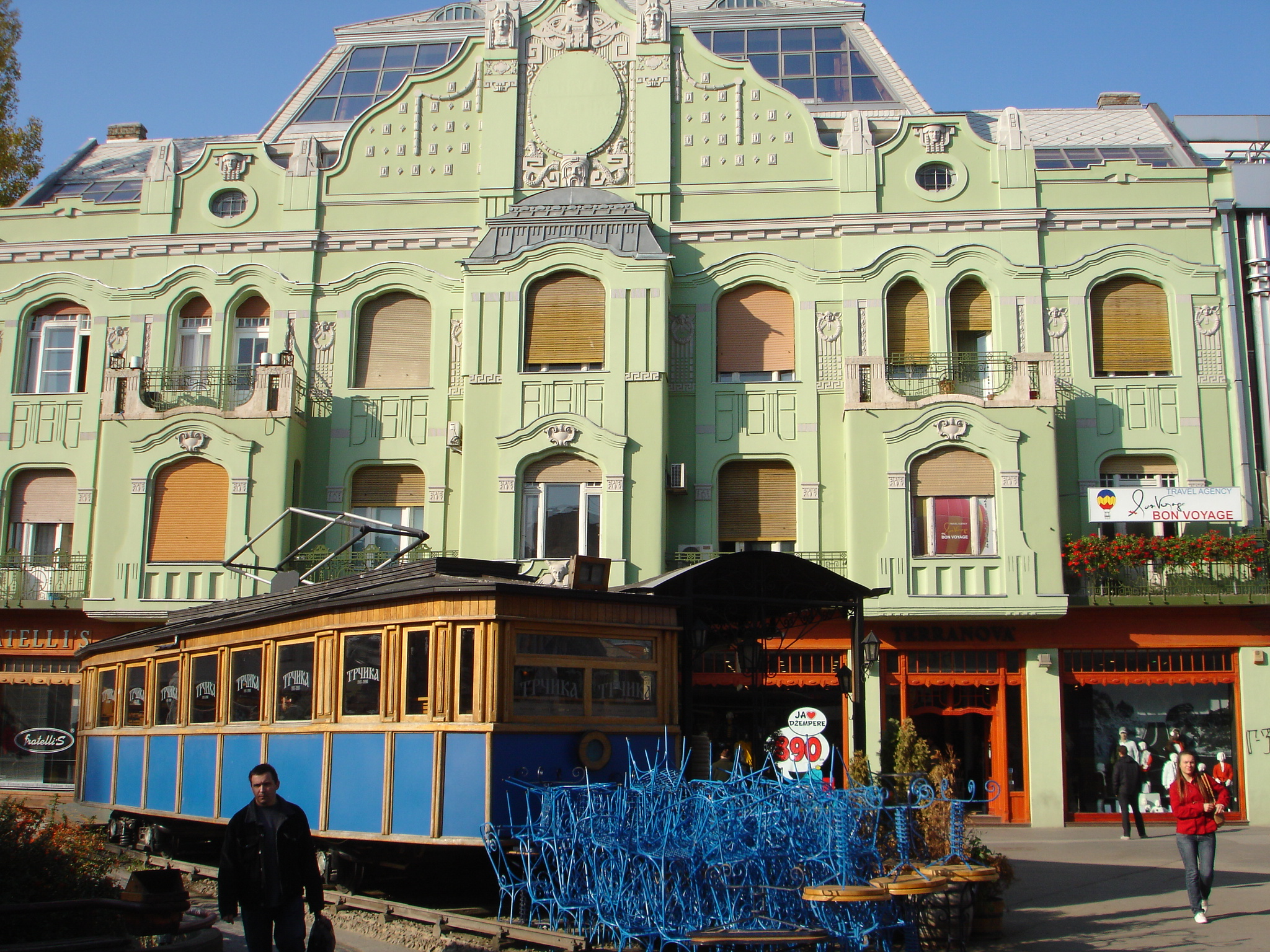 Ova zgrada je jedna od najatraktivnijih palata građenih u stilu mađarske secesije. Palatu je sagradila poznata trgovačka porodica Menrat 1908. godine, a u prizemlju su imali prodavnicu nameštaja. Na zgradi, koja je urađena po projektu Lipota Baumhorna, arhitekte iz Budimpešte, upečatljiva je glavna fasada sa balkonima, bogato ukrašenim gvozdenim ogradama. Ispred palate, u starom tramvaju, sa enterijerom u duhu starih vremena, radi jedinstven kafe-bar Trčika. Svojim položajem i izgledom privlači pažnju i turističkih grupa koje sve češće organizovano dolaze da osete ambijent jedinog preostalog tramvaja u Novom Sadu.